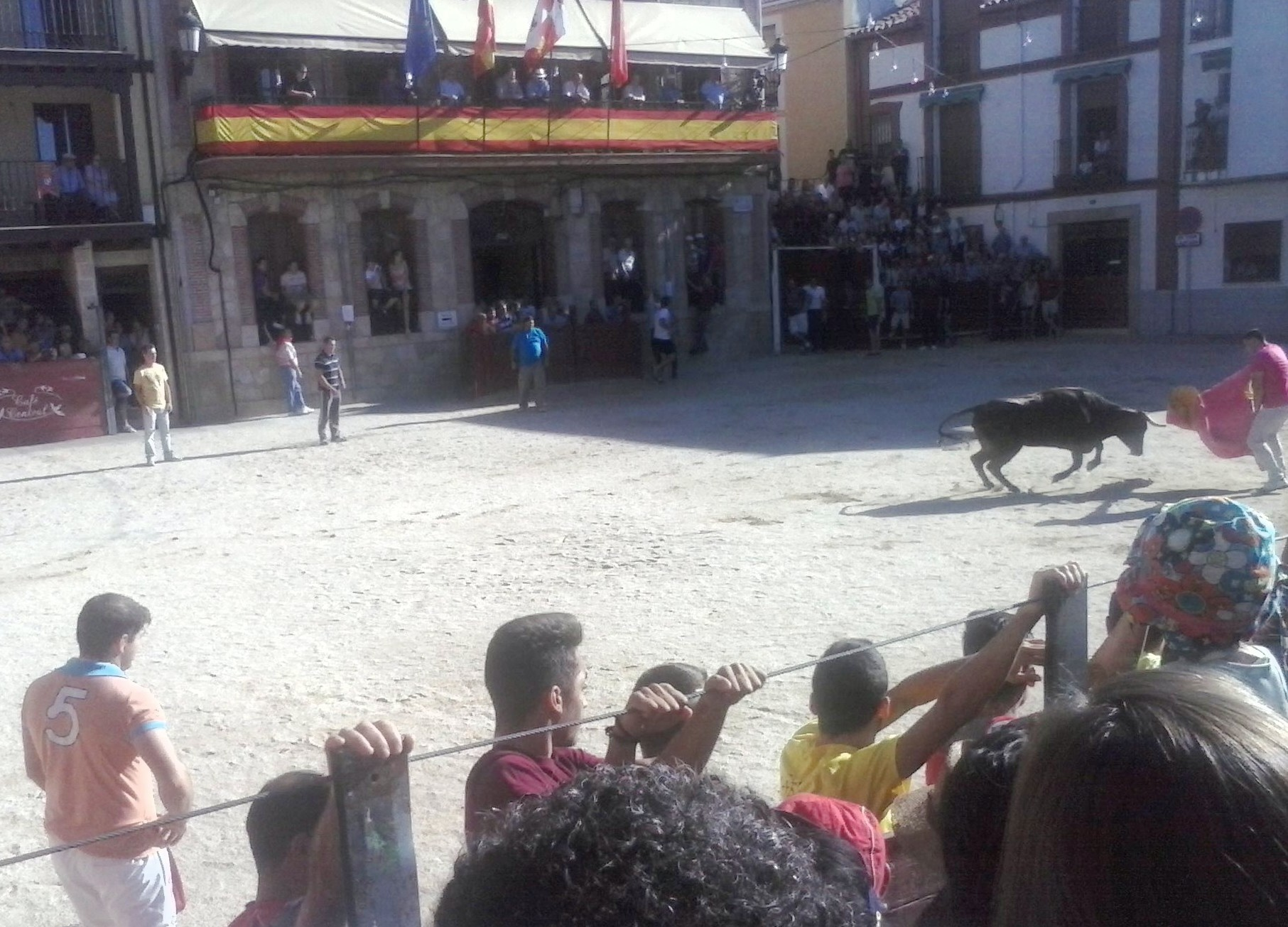 Capea en Candeleda (Ávila, España) durante las fiestas de agosto del año 2014